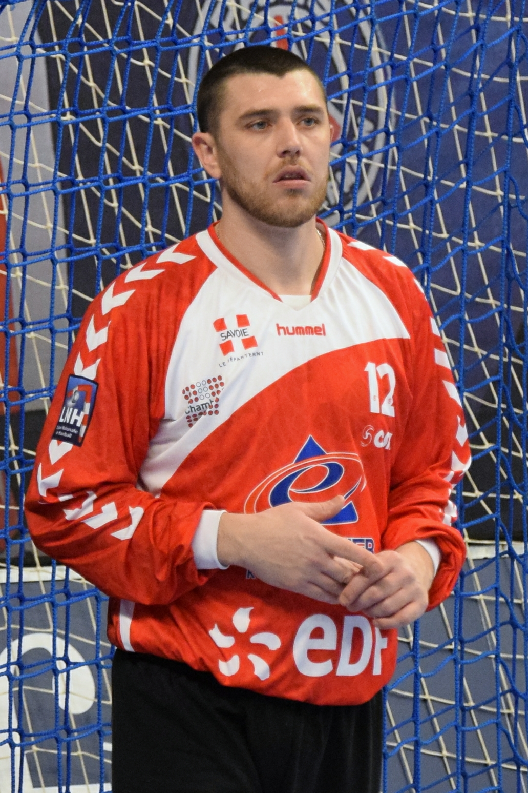 Yann Genty gardien de but de l'équipe de Chambéry Savoir Handball. Le 18 février 2015 lors de la rencontre de la 16e journée du championnat de France de D1.